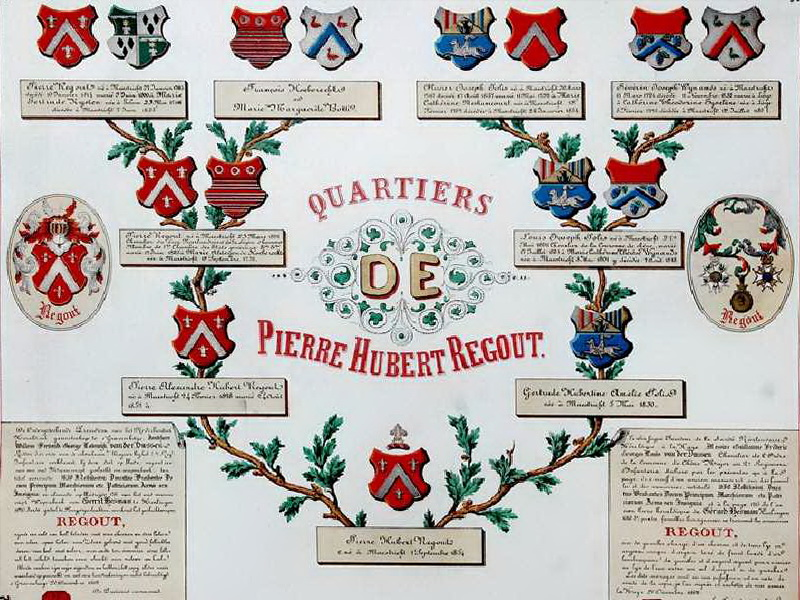 Kwartierstaat van Petrus Hubertus ("Petrus III") Regout (1854-1928), directeur van de Maastrichtse glas- en aardewerkfabrieken, vanaf 1899 De Sphinx genoemd. Prent in het Album dédié à mes enfants et mes amis (1868), dat zijn grootvader Petrus I Regout liet samenstellen om zijn rijkdom tentoon te spreiden.